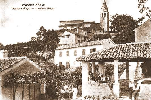 autore sconosciuto fonte propria descrizione cartolina licenza d'uso fair use note: è una vecchissima cartolina in bianco e nero (molto rara)